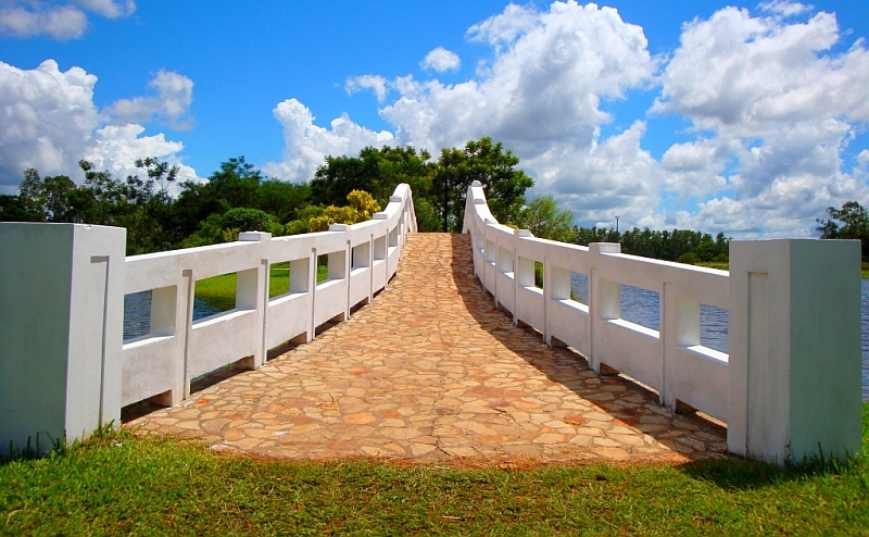 Sapere aude...Atrévete a Saber...